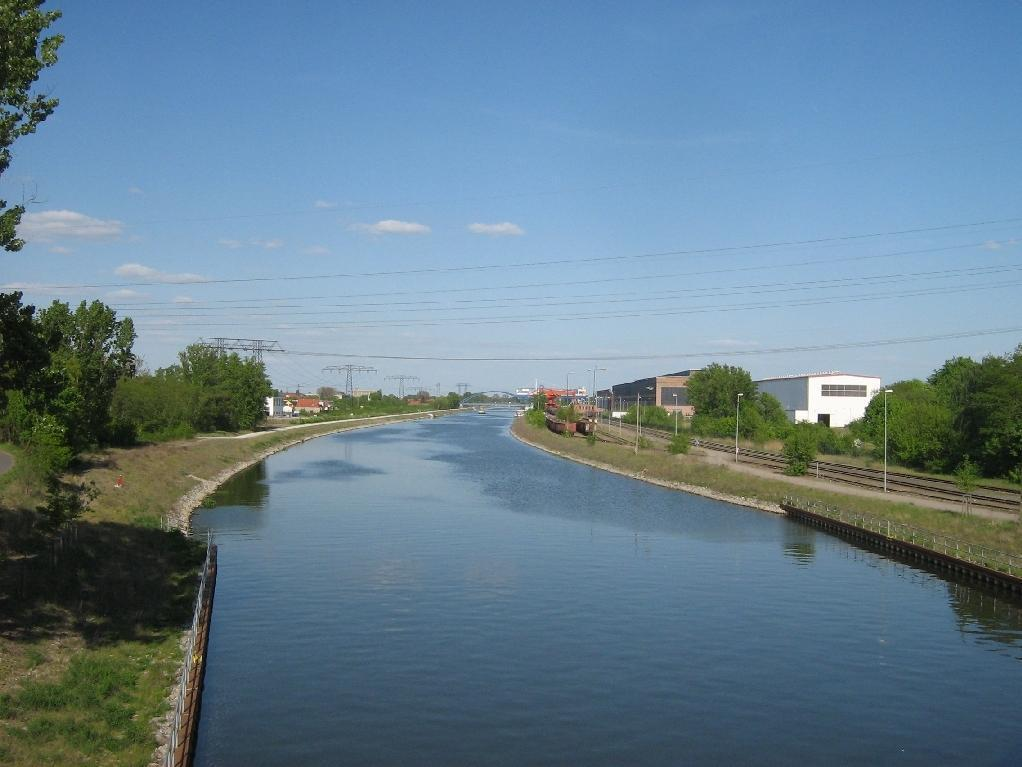 der Silokanal in Brandenburg an der Havel (Brandenburg, Germany)